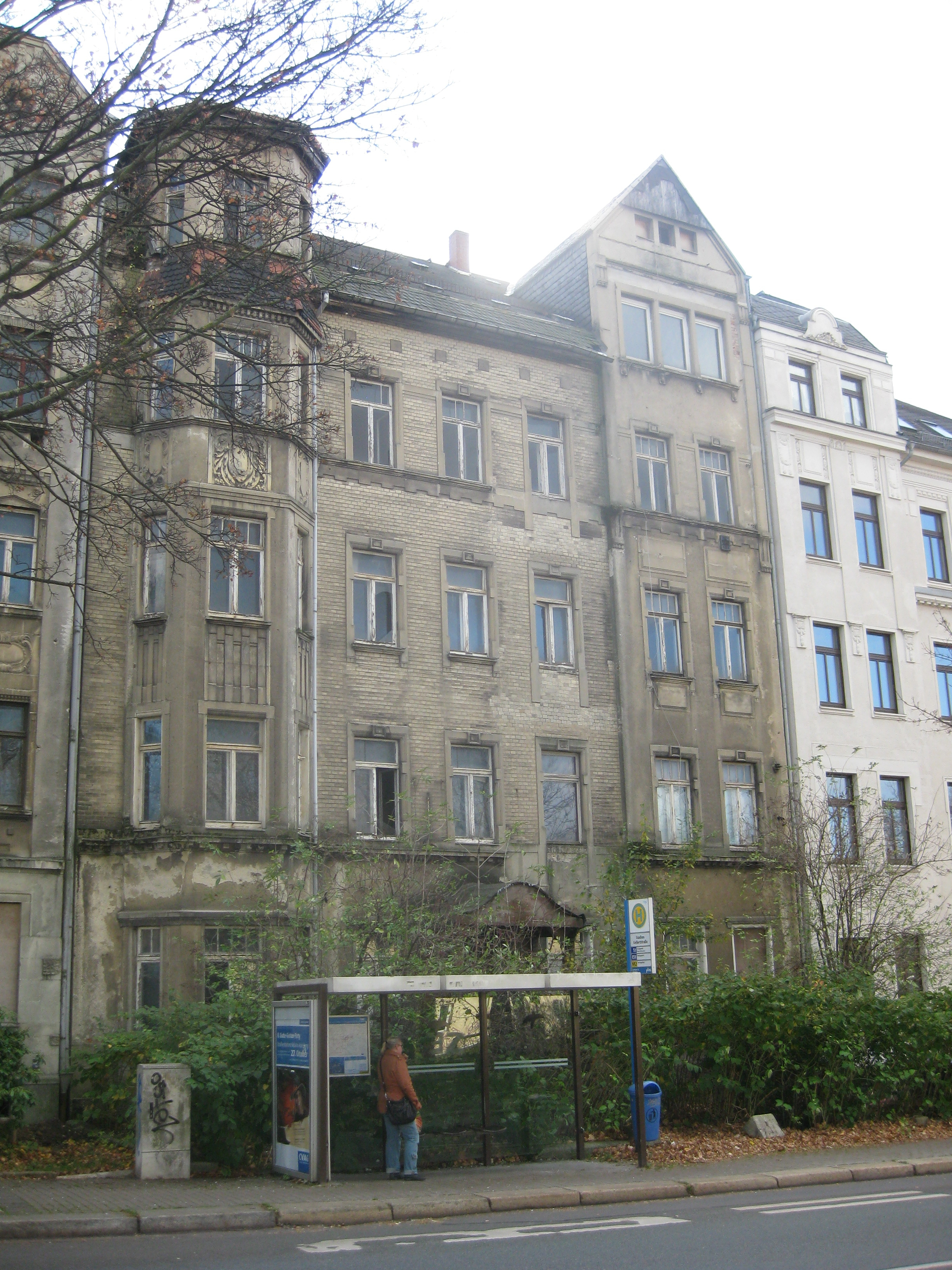 Denkmalgeschütztes Mietshaus in Chemnitz-Sonnenberg, Heinrich-Schütz-Straße 14. Unmittelbar davor befindet sich die stadtauswärtige Bushaltestelle Stadion Gellertstraße, zum Aufnahmezeitpunkt 2013 wie auch 2019 genutzt von der Tageslinie 51 Richtung Zeisigwald bzw. Yorckgebiet sowie der Nachtlinie N12 Richtung Yorckgebiet.